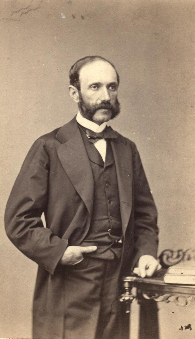 Alejandro Reyes Cotapos (Santiago, 24 de febrero de 1825 - Santiago, 8 de enero de 1884) fue un abogado y político chileno. Helsby y Ca. (Valparaíso, Chile)